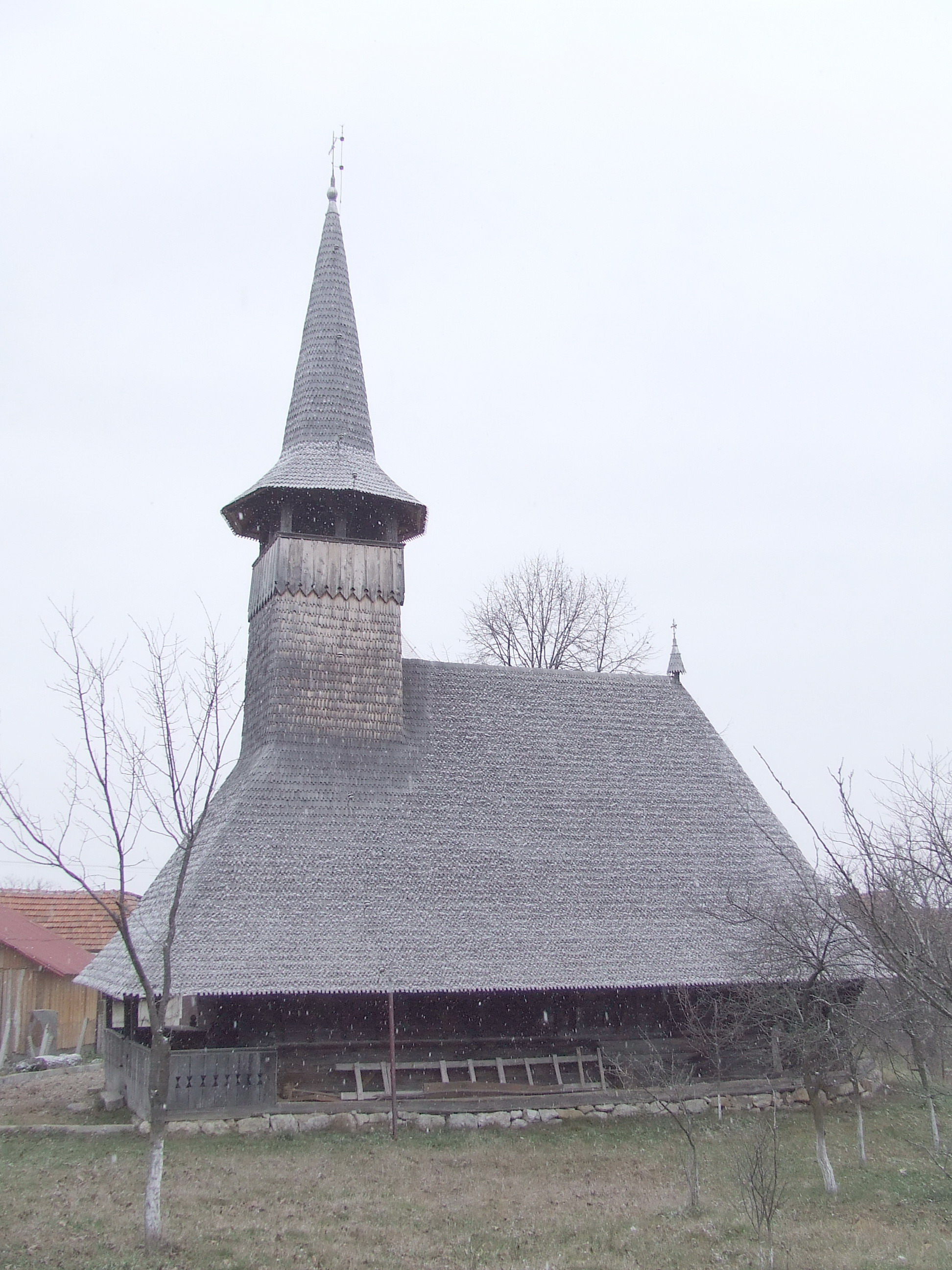 Biserica de lemn din Josani, judeţul Bihor.